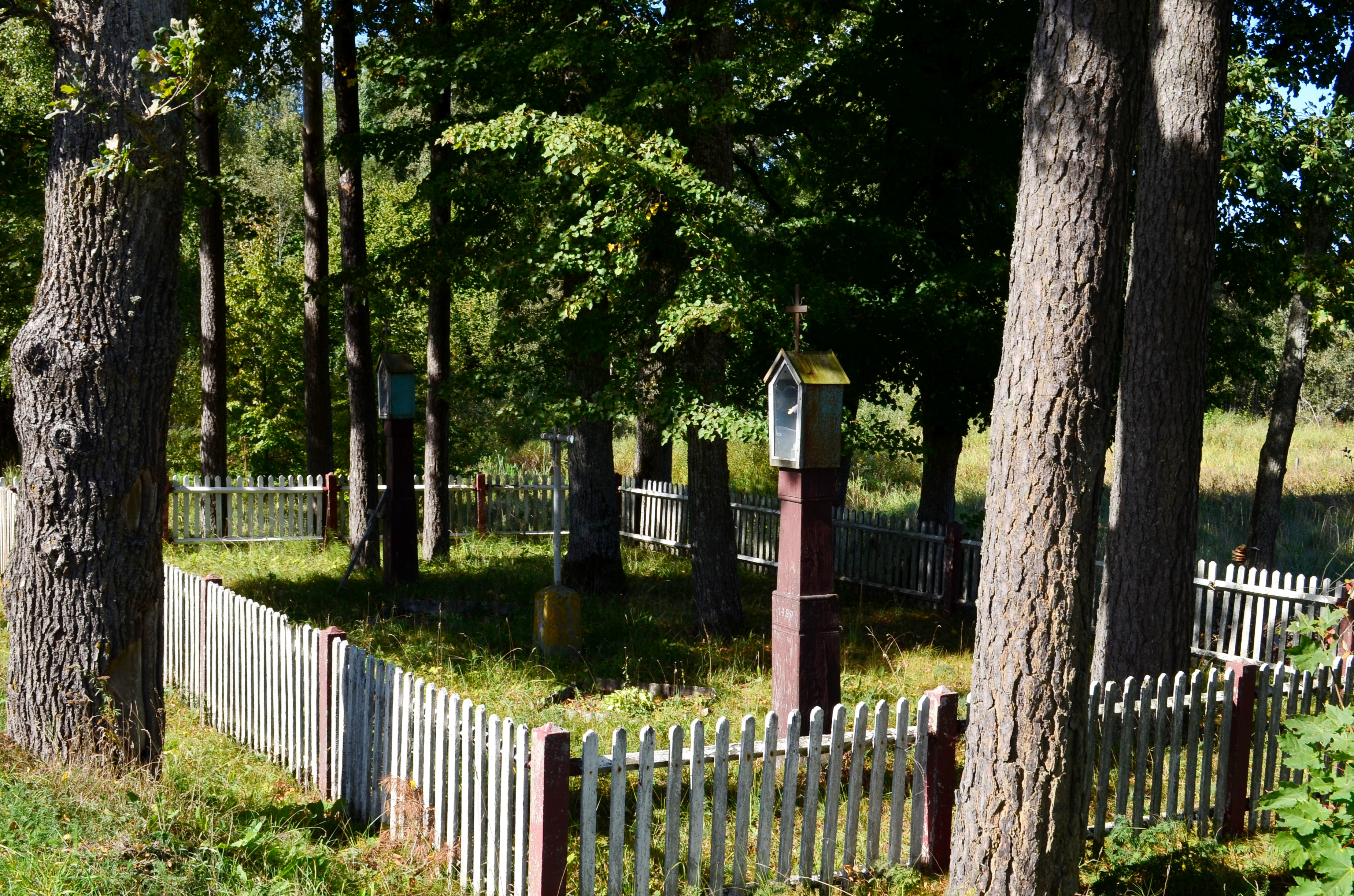 Žemaitėška: Šiaudvėitiu kapelē, Šėlotės rajuons